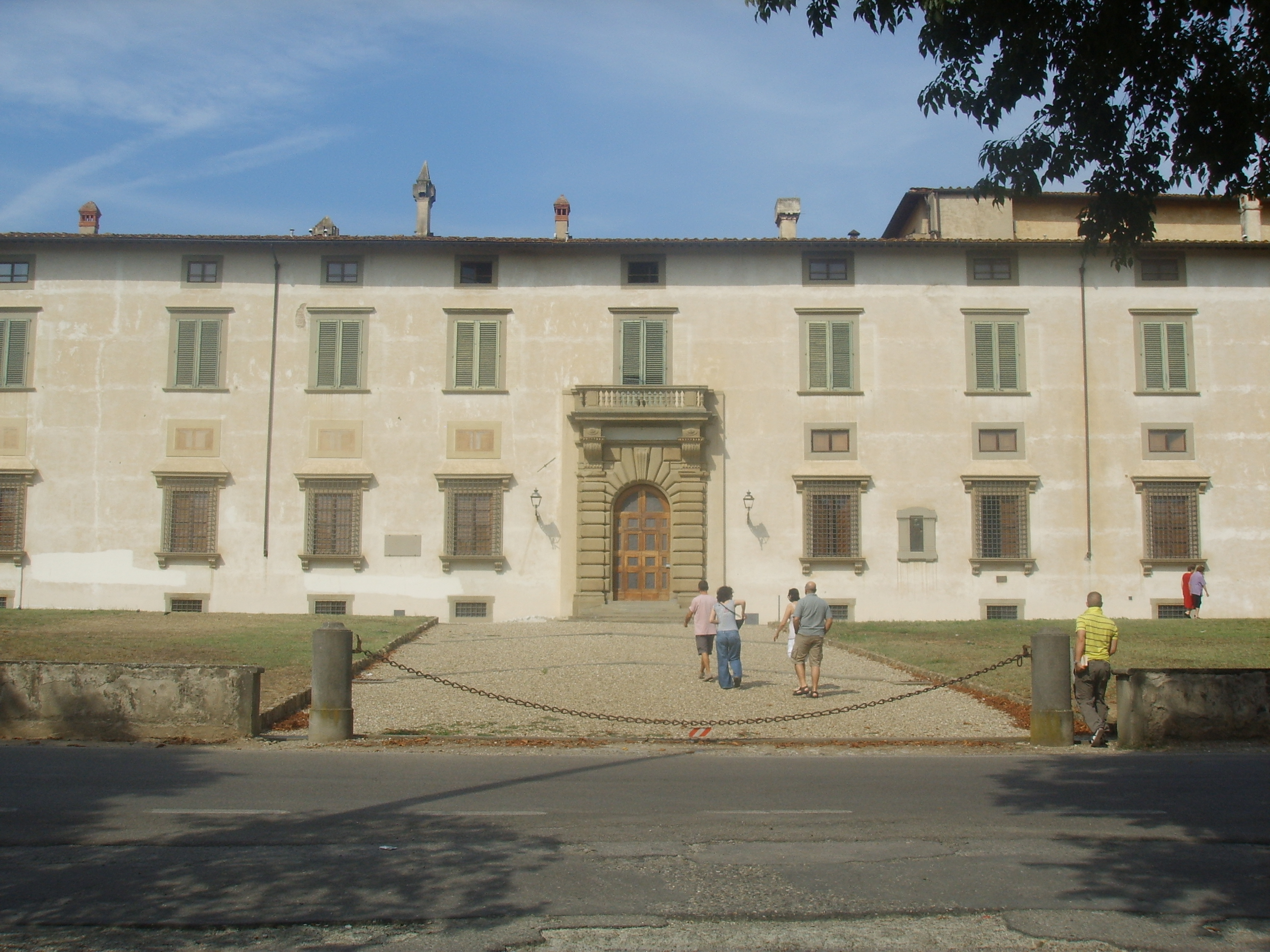 Parco di Villa Reale di Castello (Villa di Castello) in Florence Italy